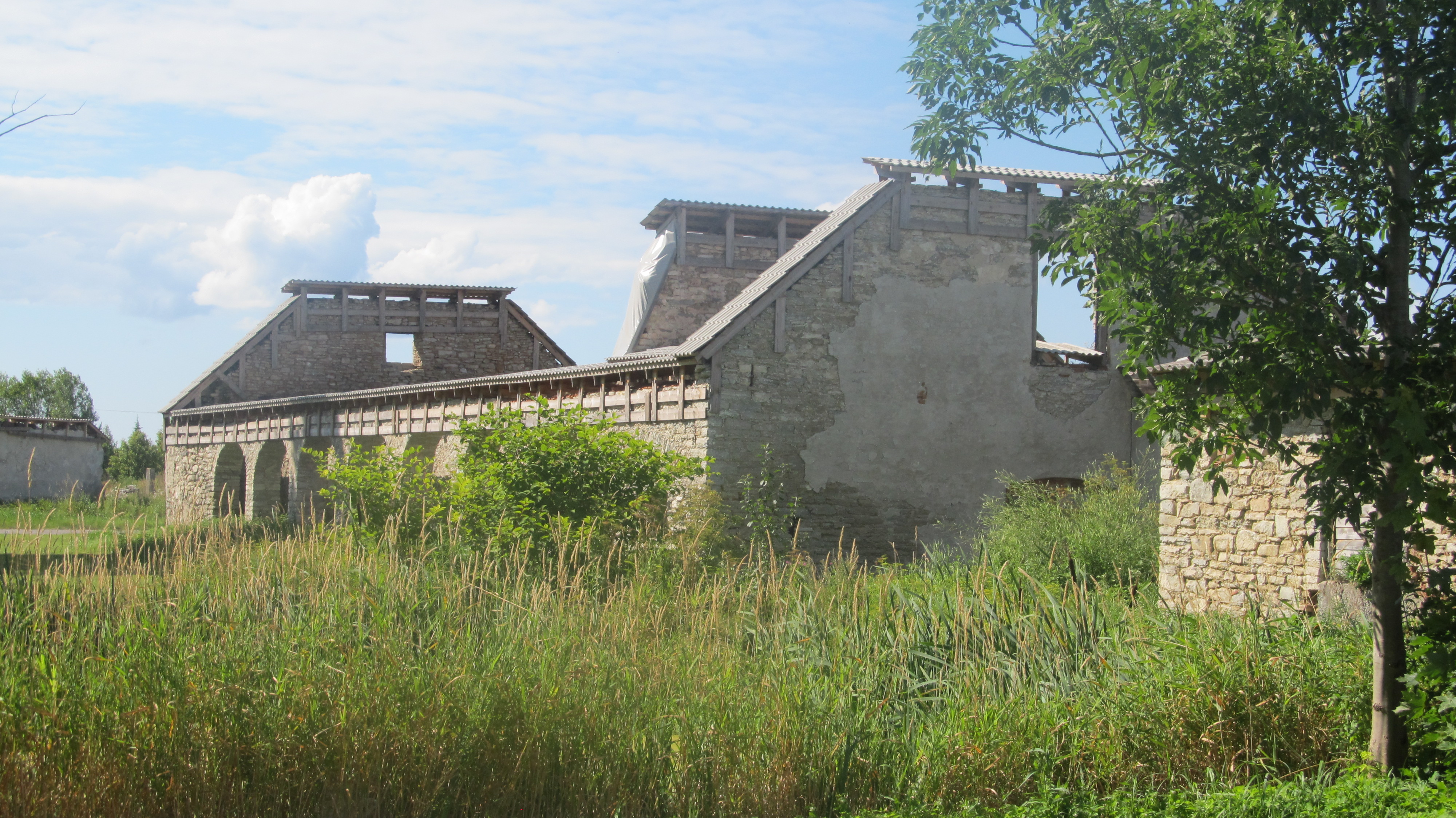 Putkaste mõisa ait